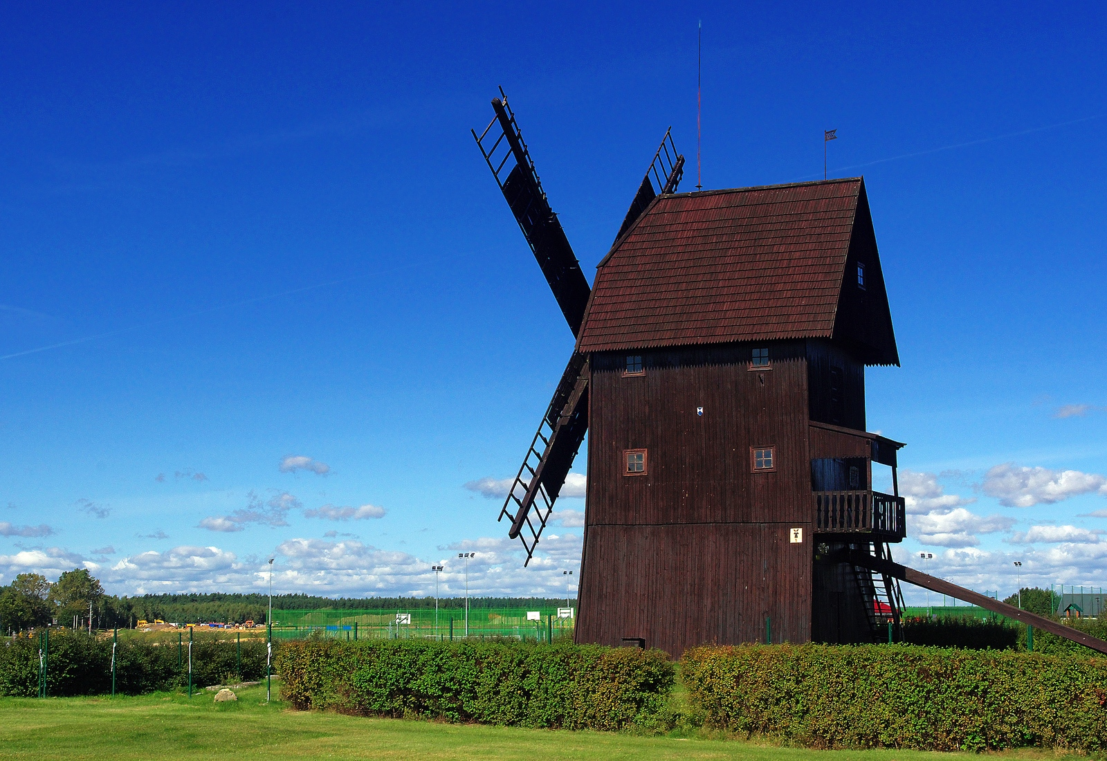 Rydzyna, os. „Młyńska Górka”, ul. Wyspiańskiego - wiatrak koźlak "Józef" z XIX w.